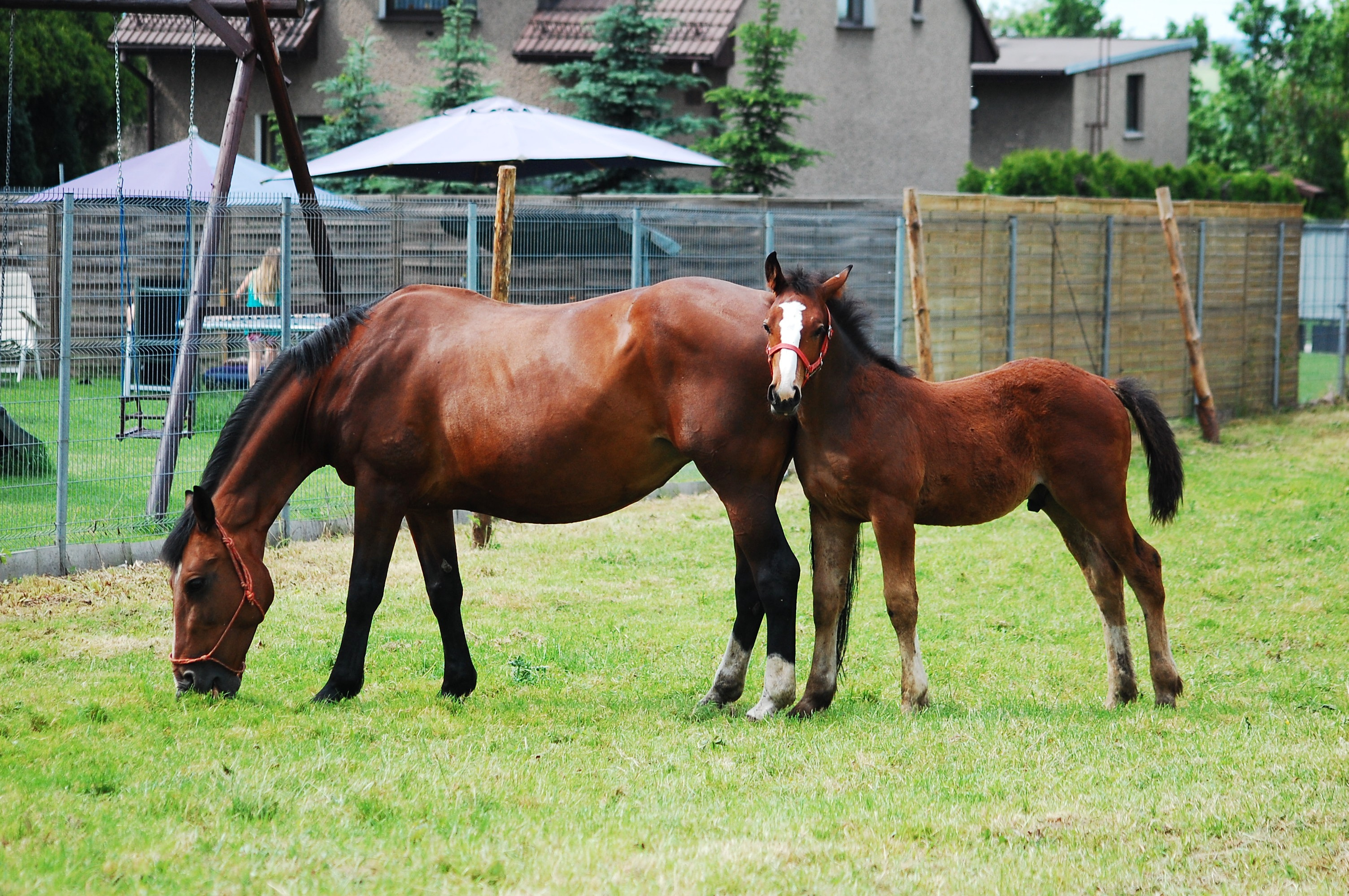 Bay Silesian horse mare with foal